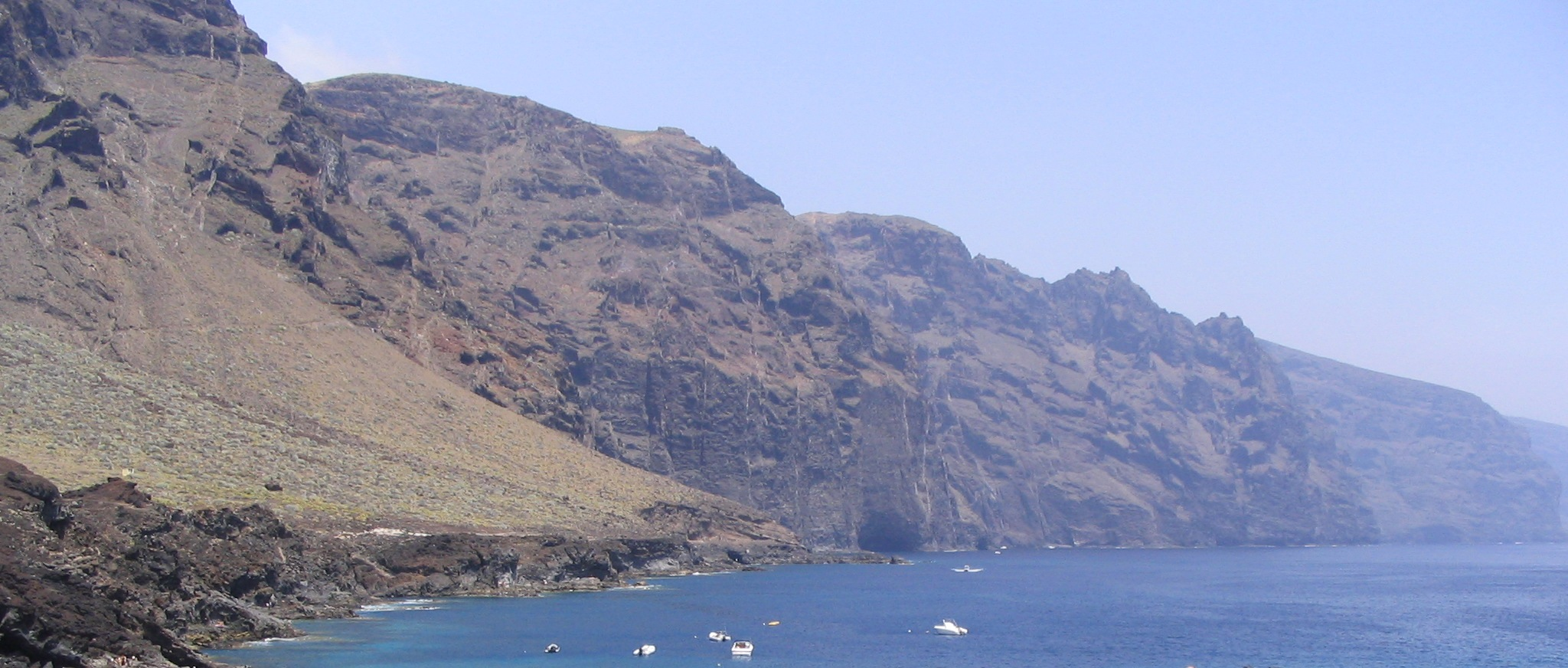 Acantilados de Los Gigantes, isla de Tenerife, Canarias, España.